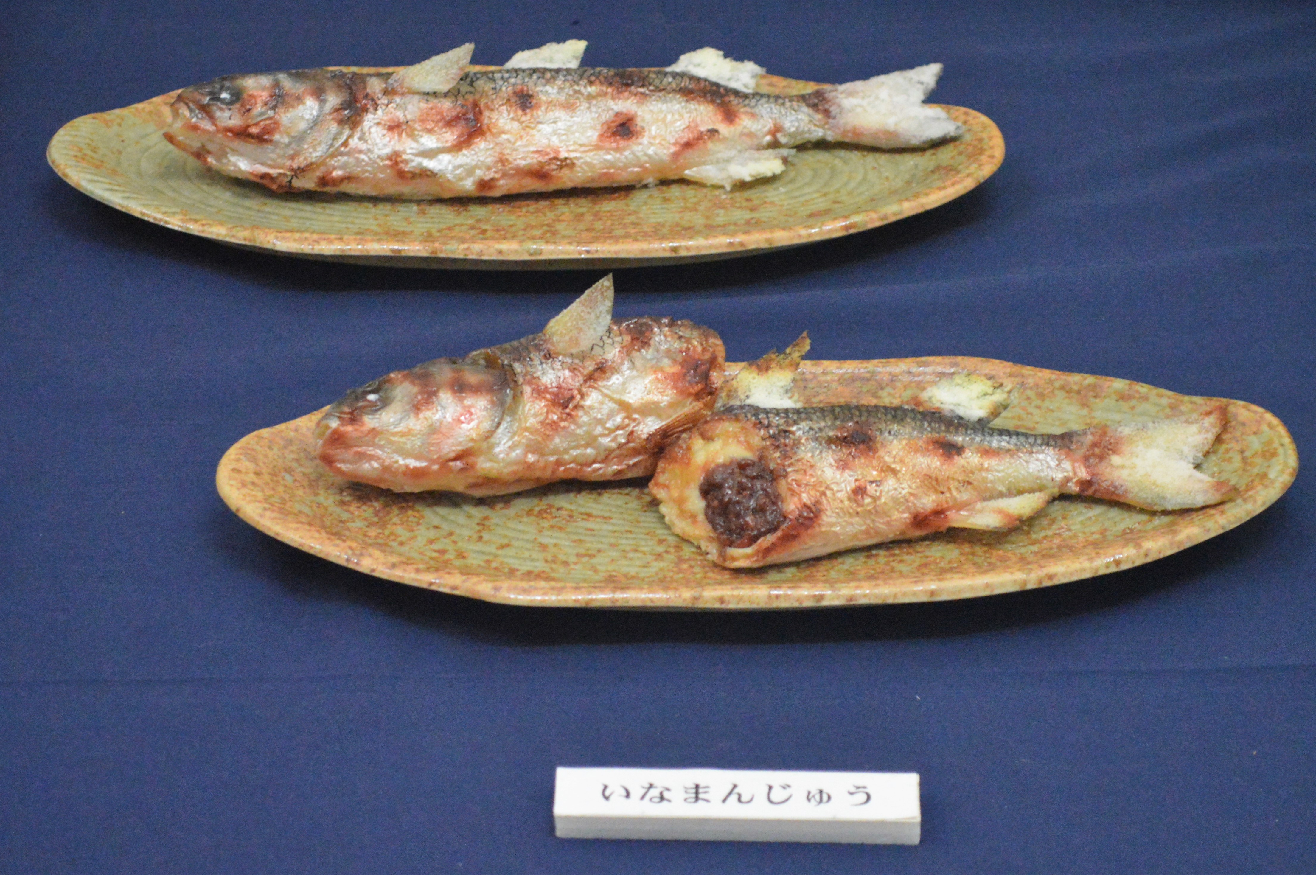 愛知県海部郡蟹江町の郷土料理「いなまん」（いな饅頭）。蟹江町歴史民俗資料館にて。